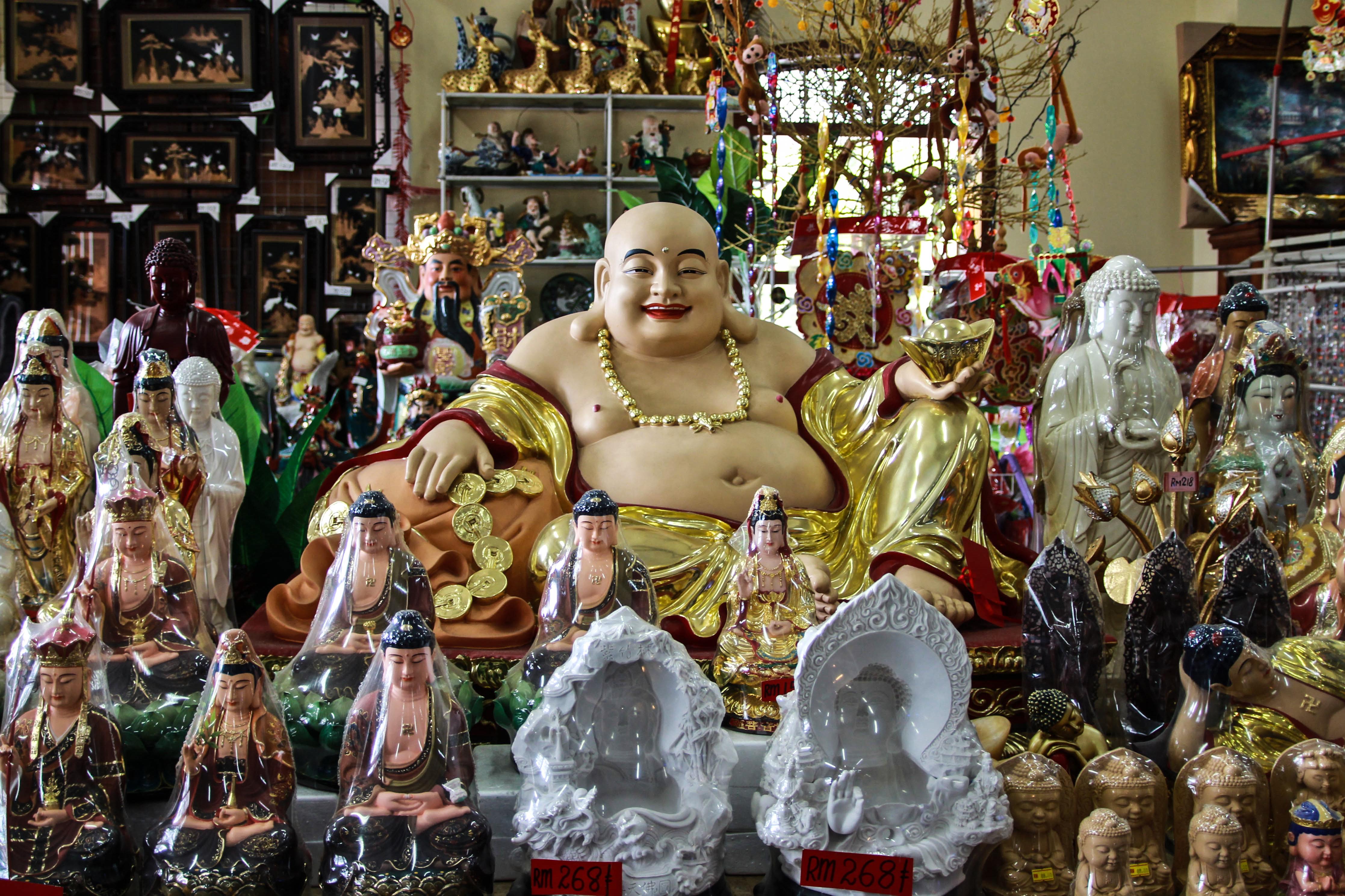 Kek Lok Si Tempel, Georgetown, Penang